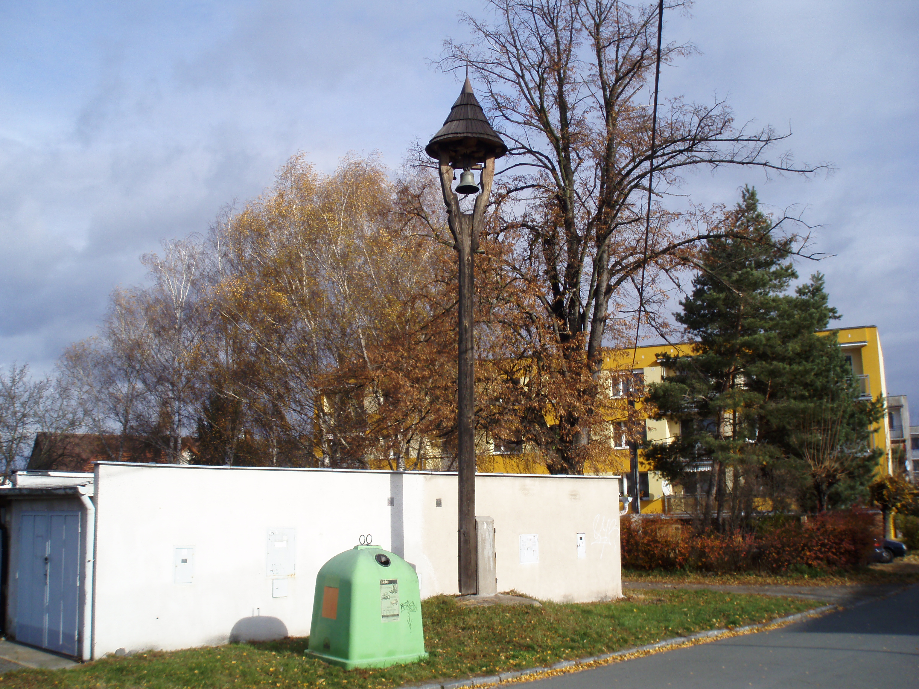 Zvonička ve Farářství (Hradec Králové)